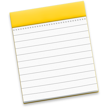 Notes logo on macOS